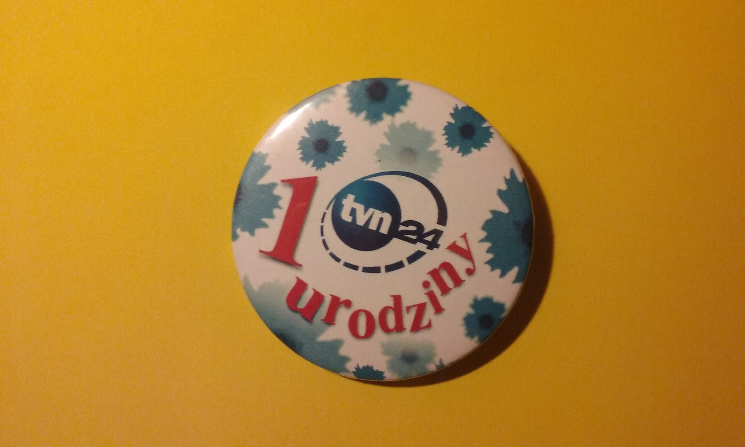 Pracownicza plakieta okolicznościowa z okazji pierwszych urodzin pierwszego polskiego kanału informacyjnego TVN24, z sierpnia 2002 roku.